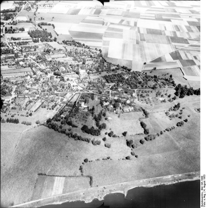 Rheinbefliegung der Alliierten 1953